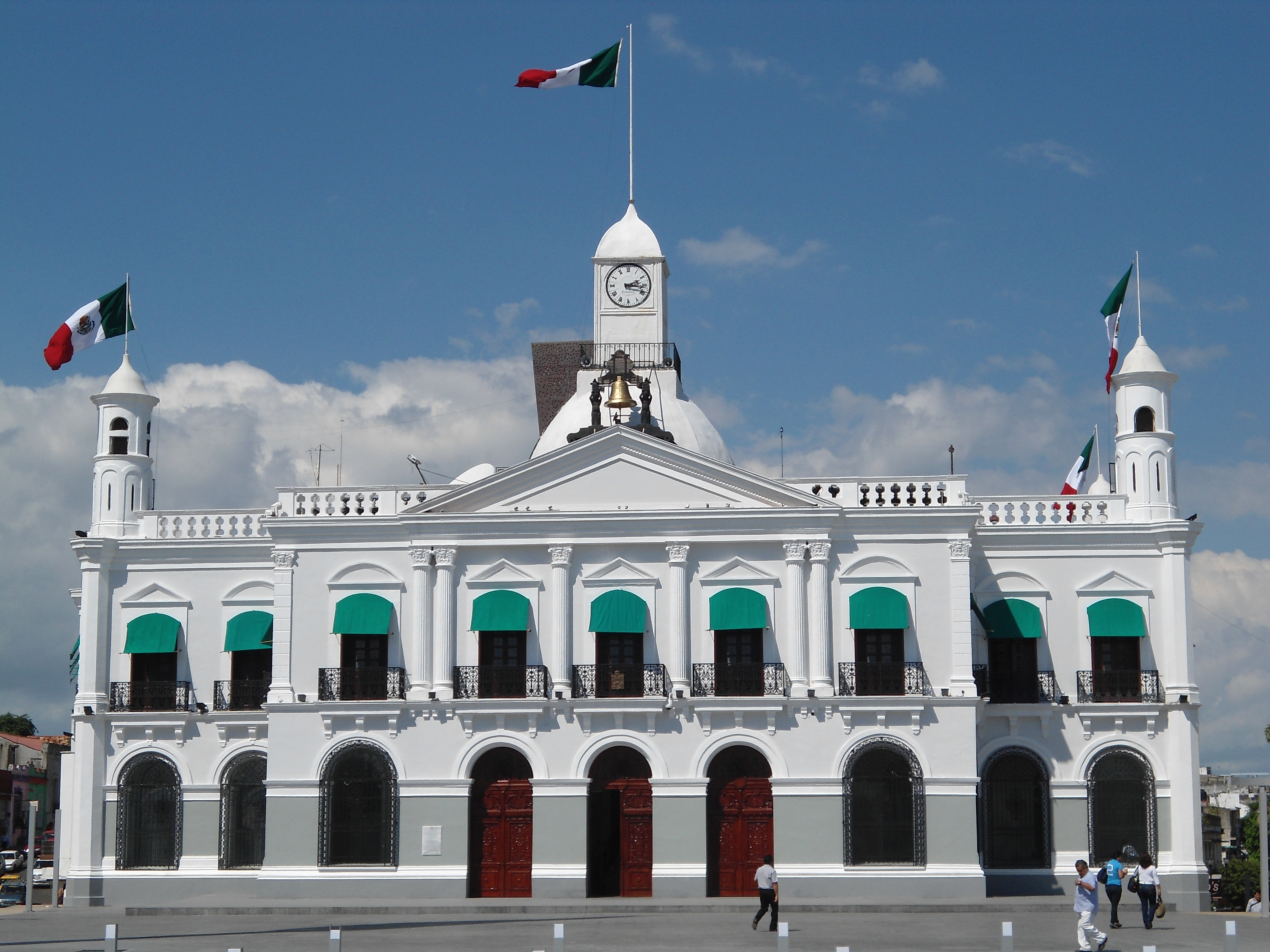 Palacio de Gobierno de Tabasco. Plaza de Armas, Villahermosa, Tabasco, México.